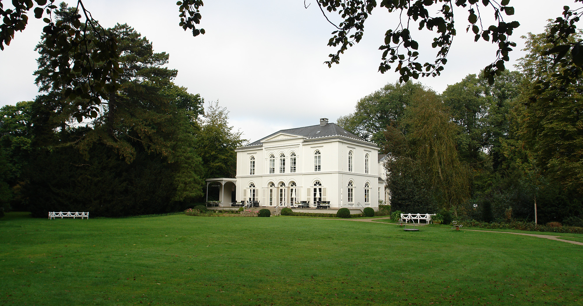 Landsitz Caesar-Ichon, Landgut Post in Bremen, Oberneulander Landstraße 70.Das abgebildete Objekt ist ein geschütztes Kulturdenkmal in der Freien Hansestadt Bremen, mit der Nr. 0948,T beim Landesamt für Denkmalpflege registriert.